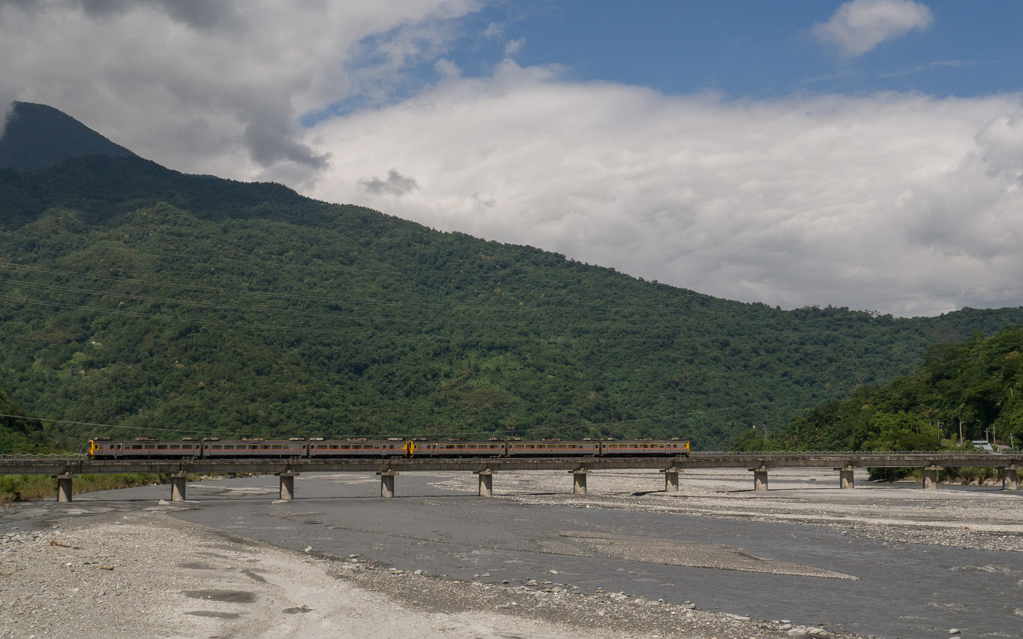 豐坪溪橋